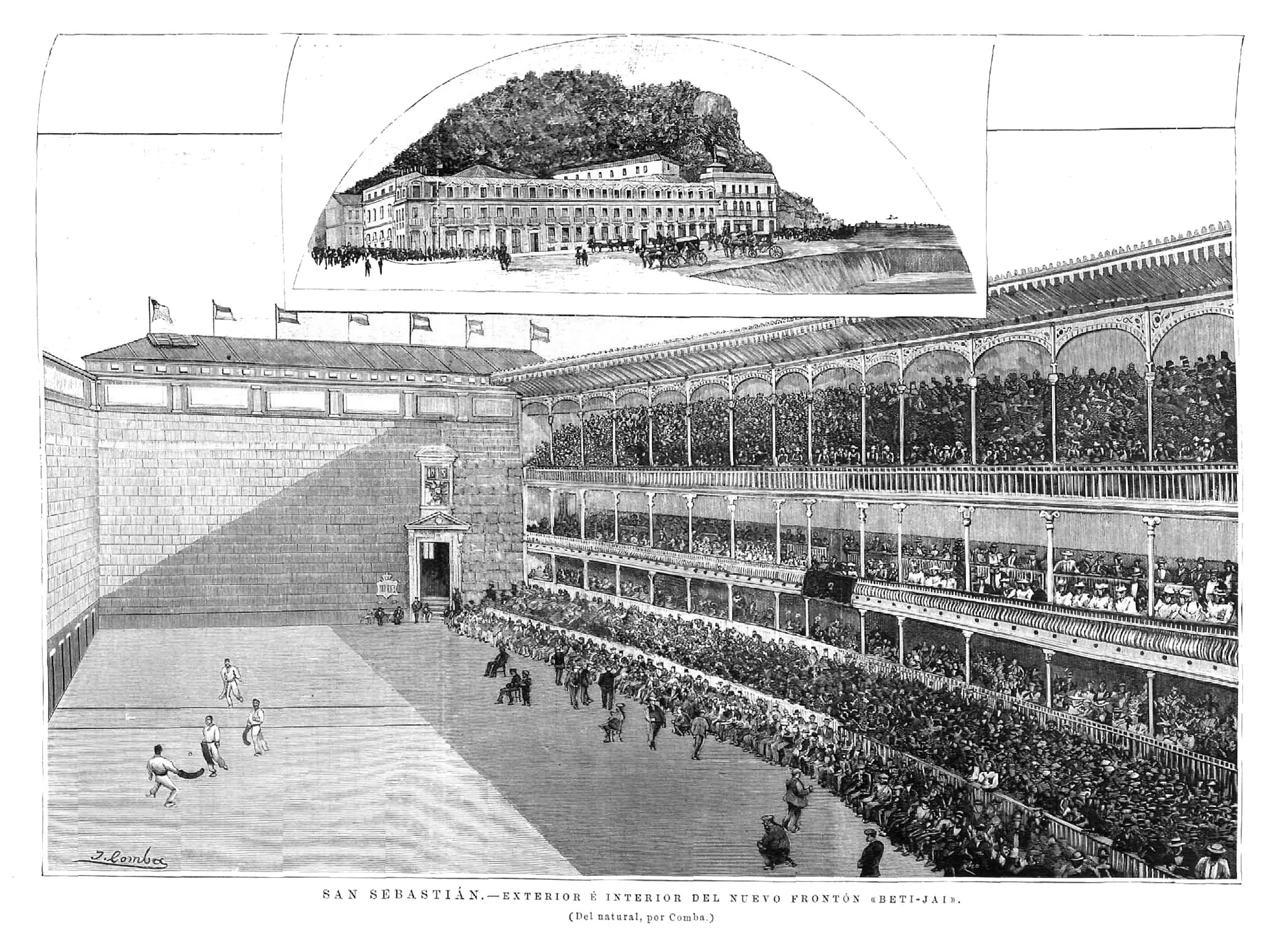 Frontón Beti Jai de San Sebastián. Vista exterior e interior